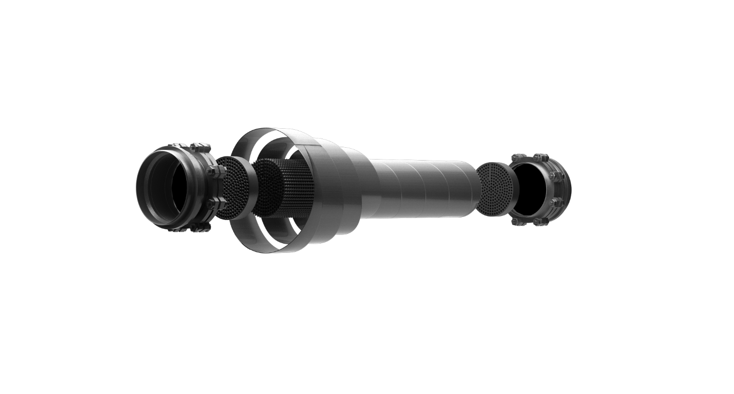 Конструкция сильфонно-трубчатого теплообменника. Показано его устройство, пучок витых трубок, закрепленный в спиральношовном корпусе.